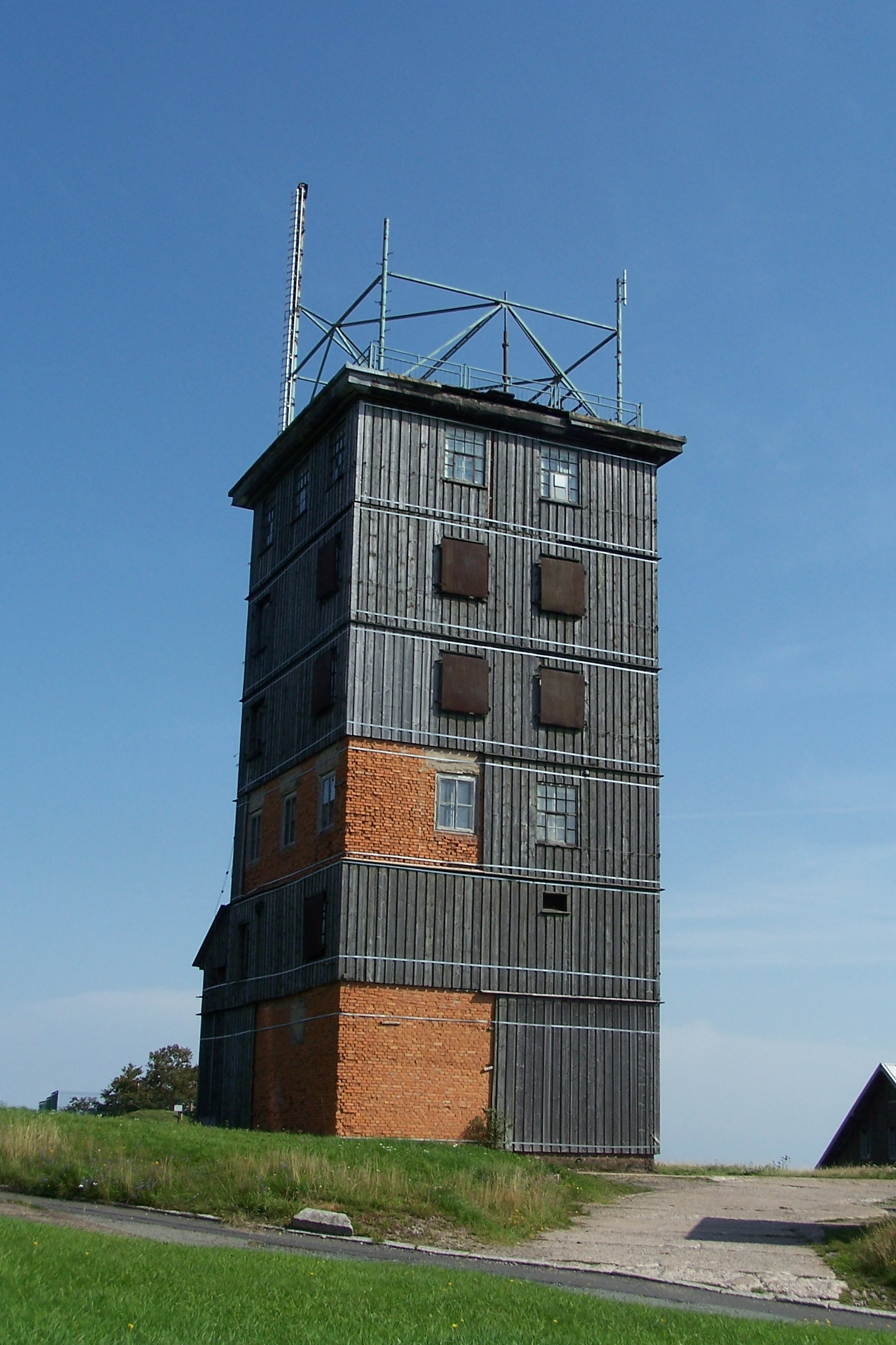 Der alte Turm, ehemaliger Standort der Wetterwarte Großer Inselsberg.